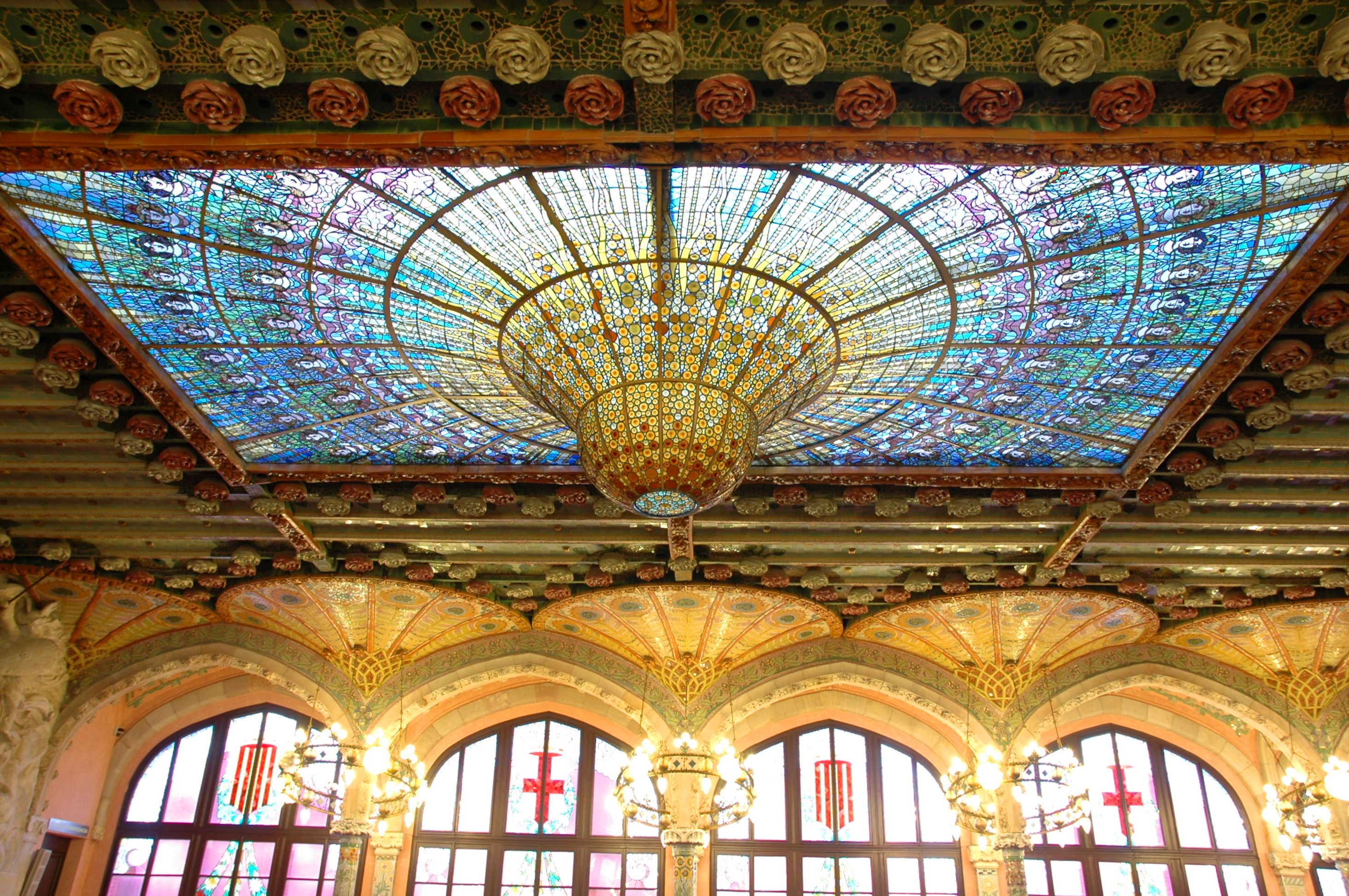 Palau de la Música - Lluernari